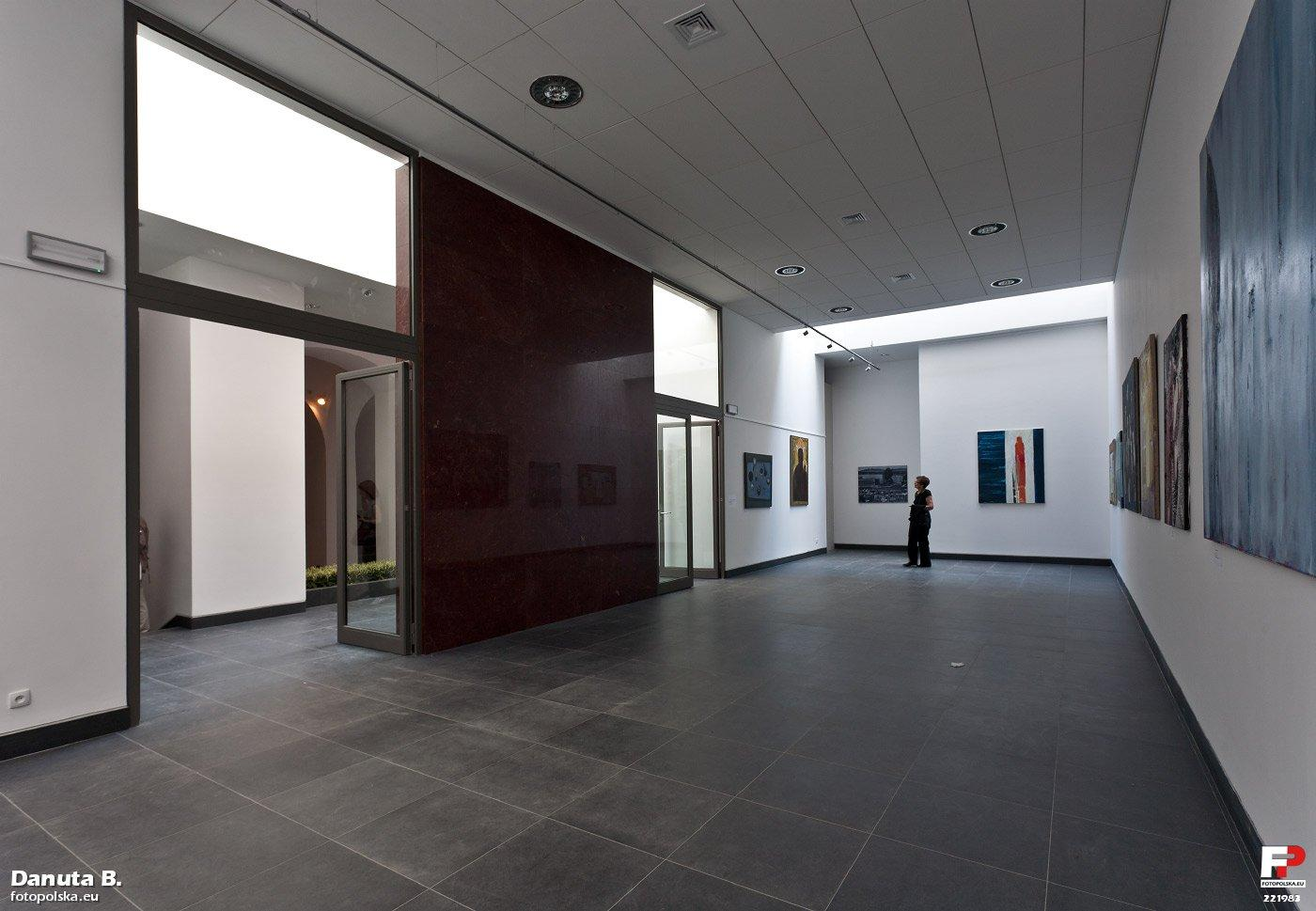 Budynek, w którym, jak pamiętamy ze szkolnych wycieczek, studiował Jan Matejko. Poziom pierwszego piętra. Sala ekspozycyjna po remoncie wnętrza dostosowanego do współczesnych standardów - nowa posadzka, oświetlenie, wentylacja, inst. p.poż, może coś jeszcze.